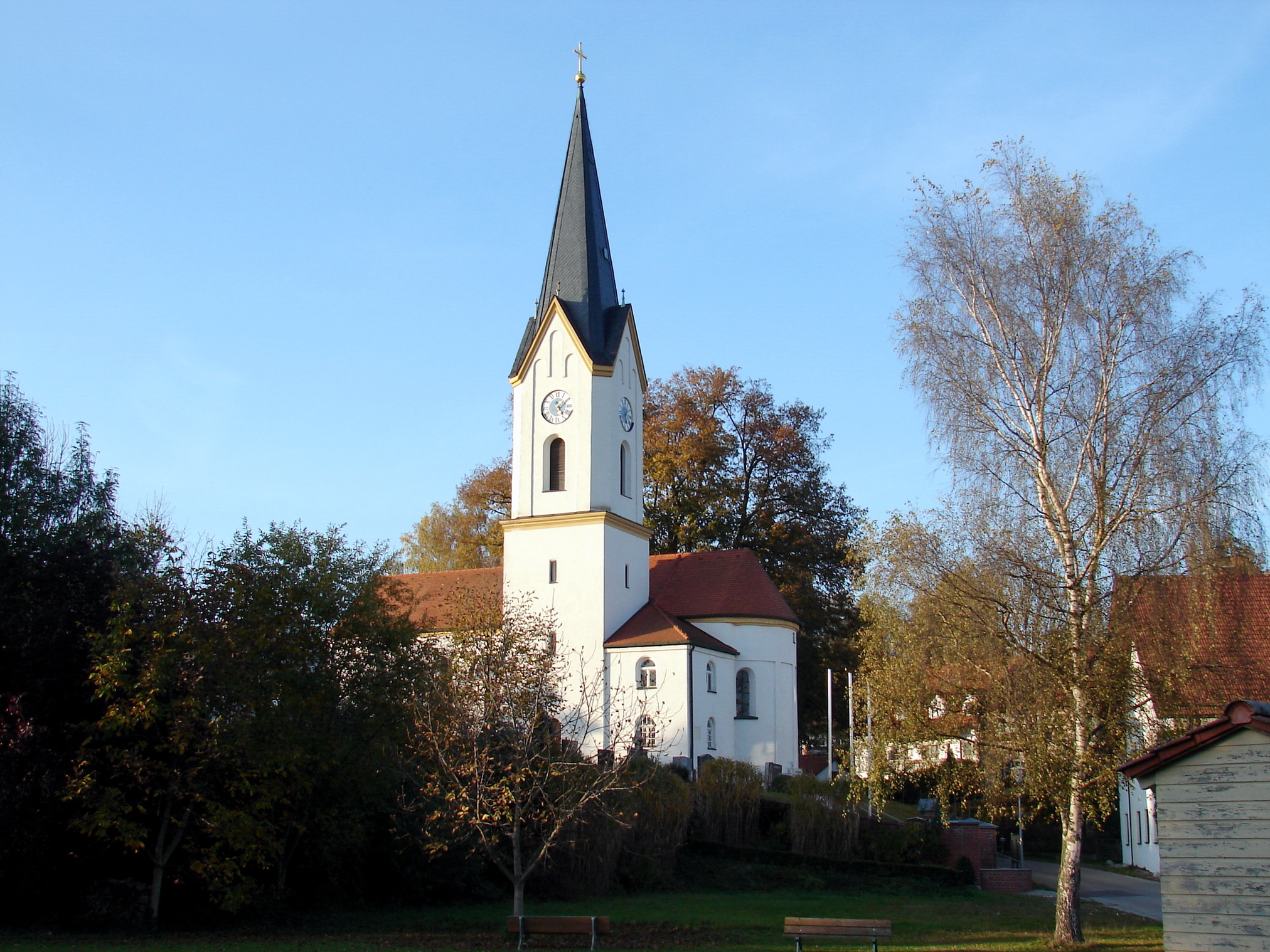 im Kern wohl mittelalterlicher Saalbau mit Apsis, Chorflankenturm von 1882 und angefügter zweigeschossiger Sakristei, barocker Ausbau 1709; mit Ausstattung